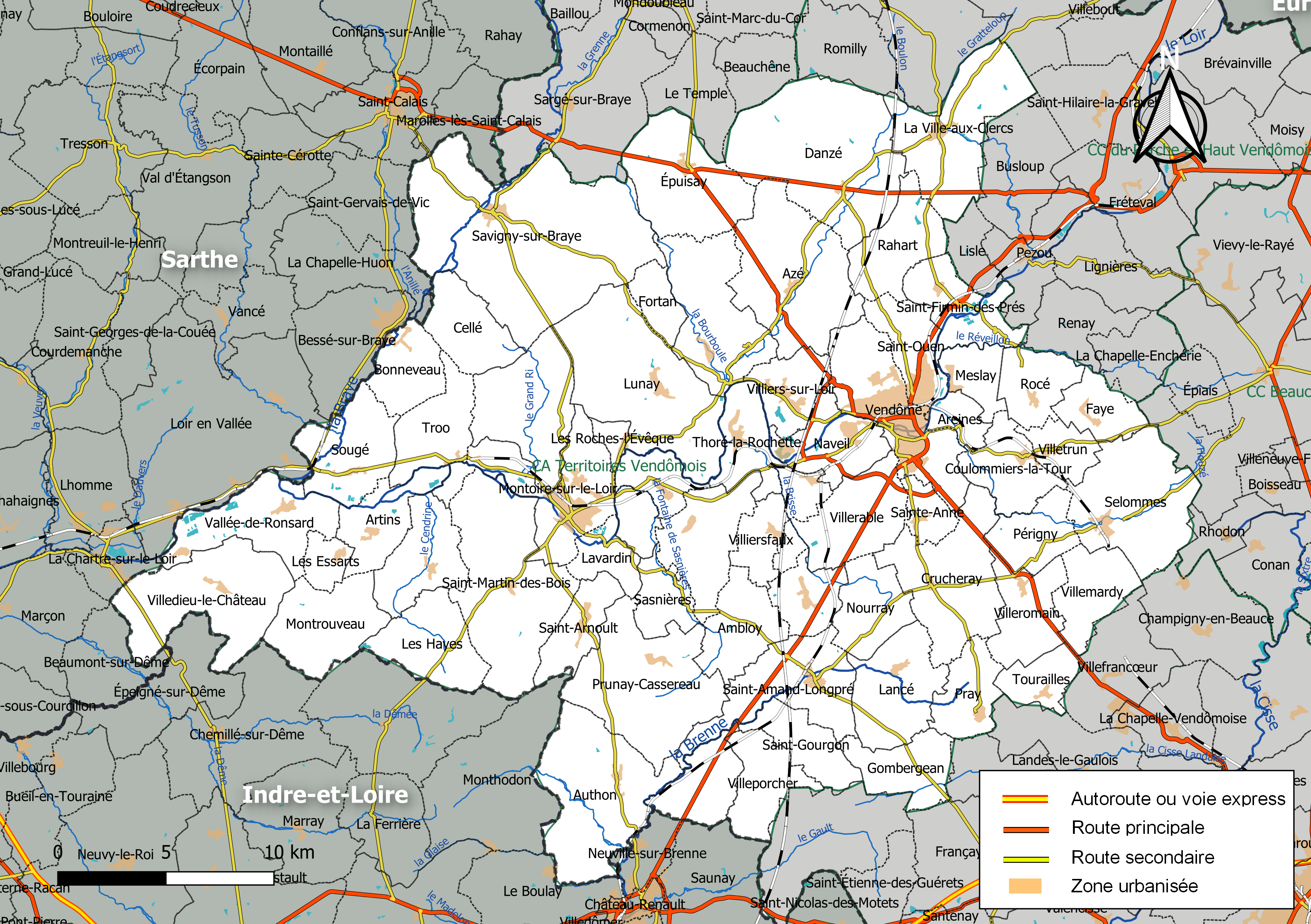 Carte de la communauté de communes Territoires Vendômois, département de Loir-et-Cher, France. Composition au 1er janvier 2019.